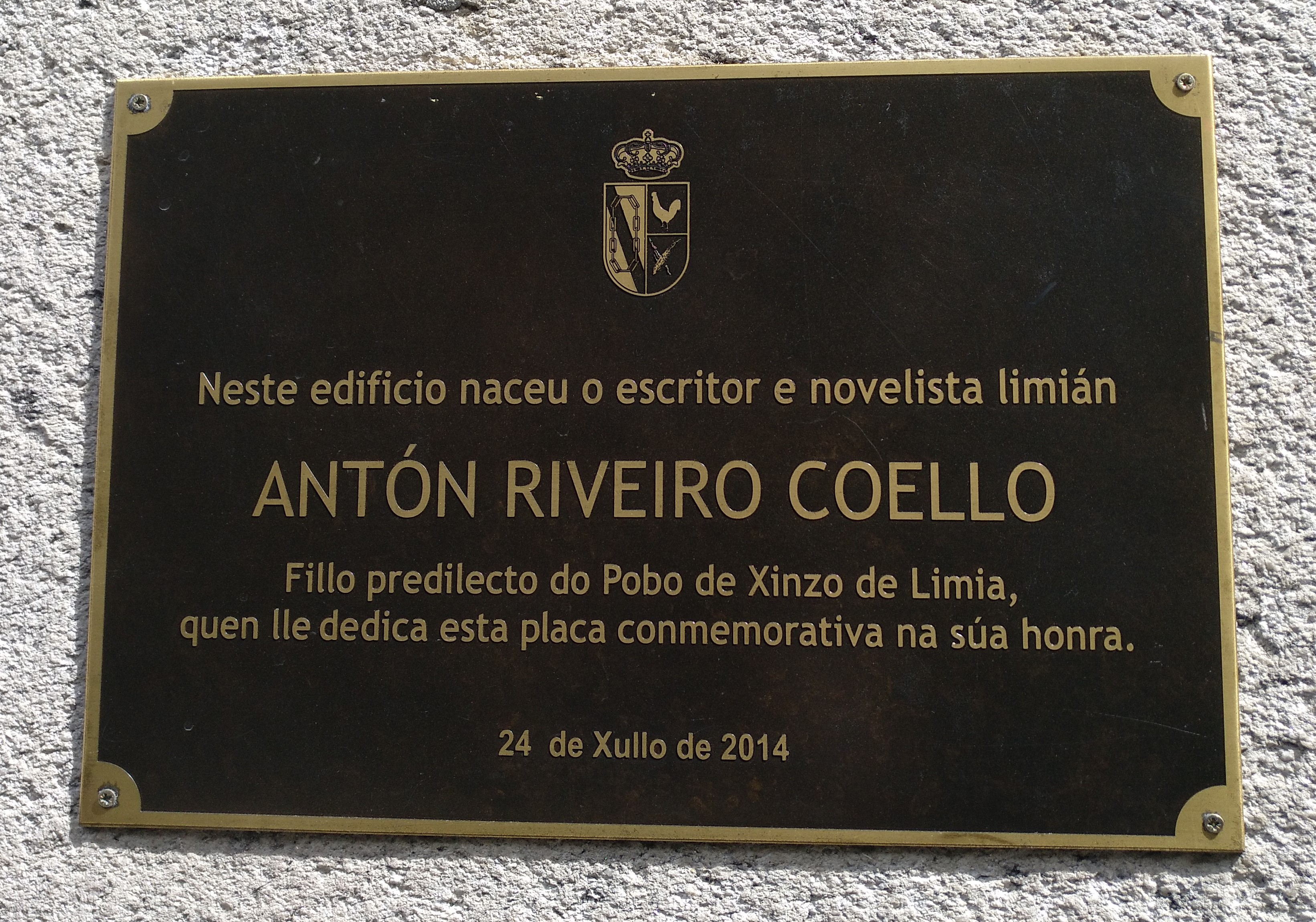 Placa en Xinzo de Limia na casa onde naceu Antón Riveiro Coello